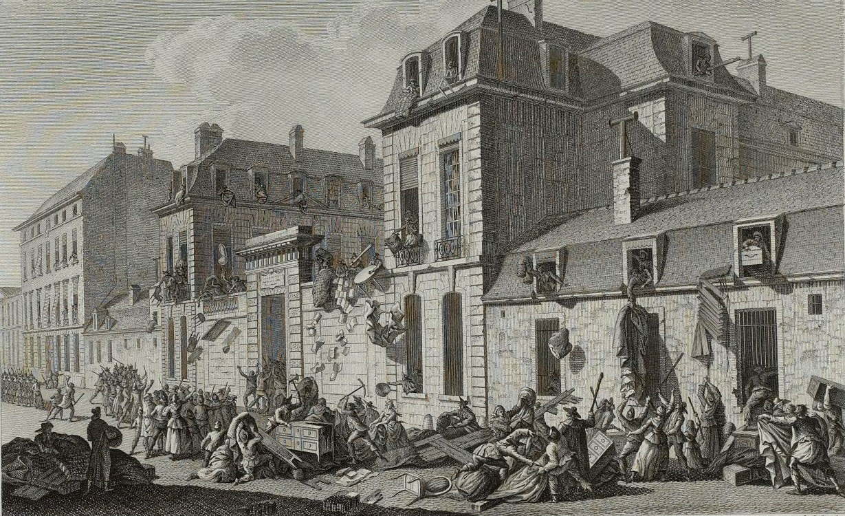 Pillage Hôtel de Castries à Paris le 13 novembre 1790, gravure de Jean-Louis Prieur, Musée de la Révolution française.